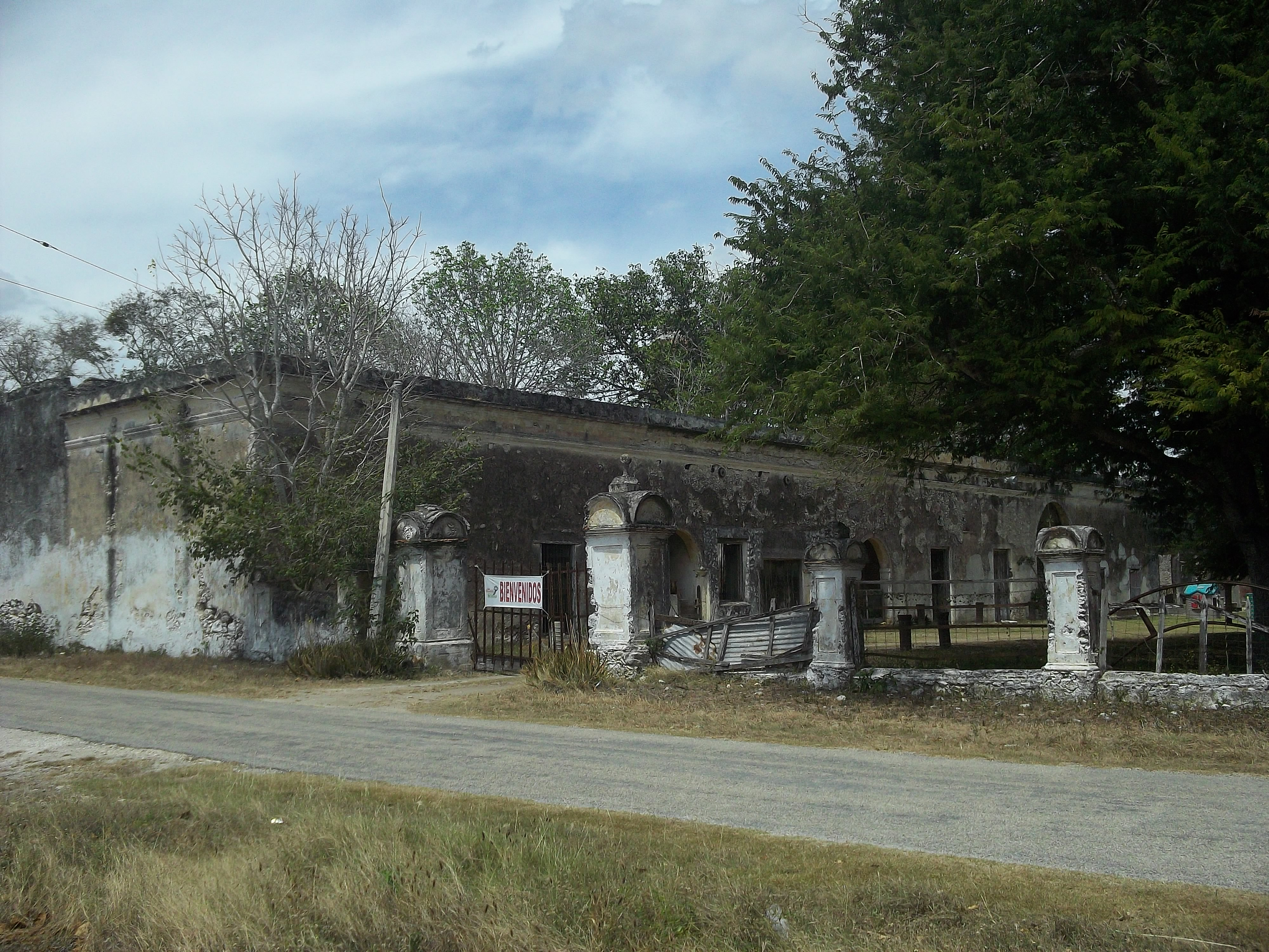 San Antonio Chel, Yucatán.